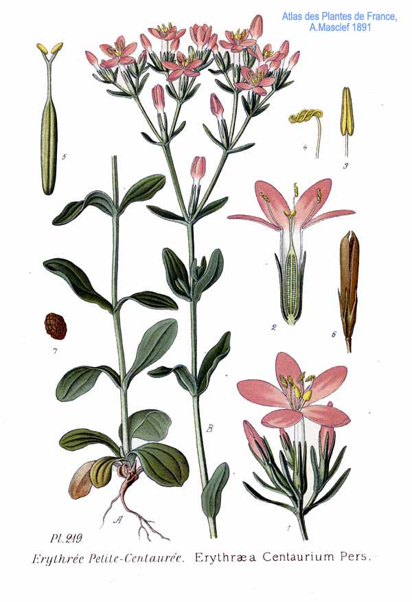 Tela-Botanica: Centaurium erythraea - syn. Erythraea centaurium (L.) Pers. Erythraea centaurium Pers.